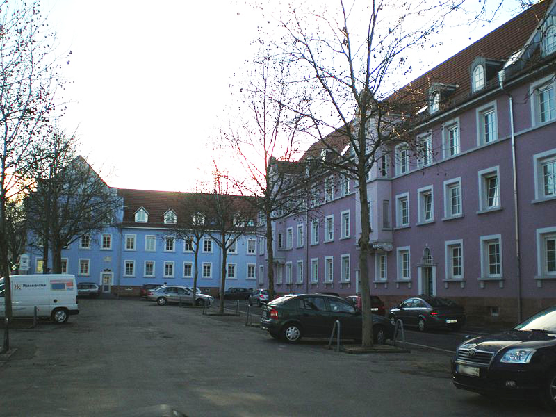 Bunter Block in Kaiserslautern, Königsstraße